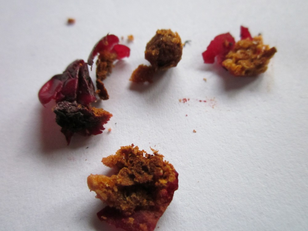 Weißdorn (Crataegus monogyna) im Hockenheimer Rheinbogen